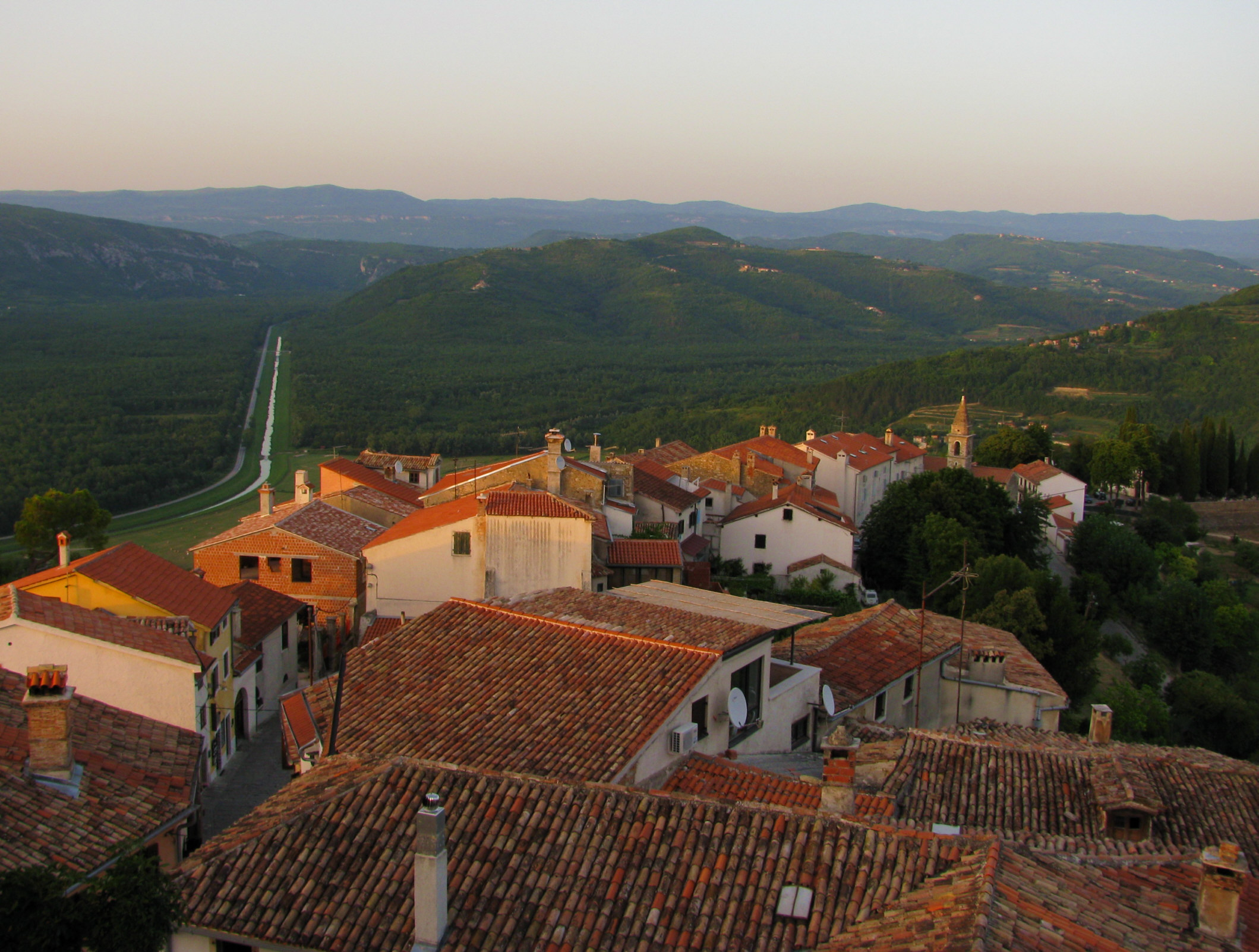 Motovun - Panoramablick von der Stadtmauer aus